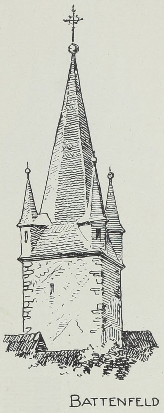 Turmstudien 3 gotische Türme mit schlanker Pyramide und Wichhäusern-Battenfeld